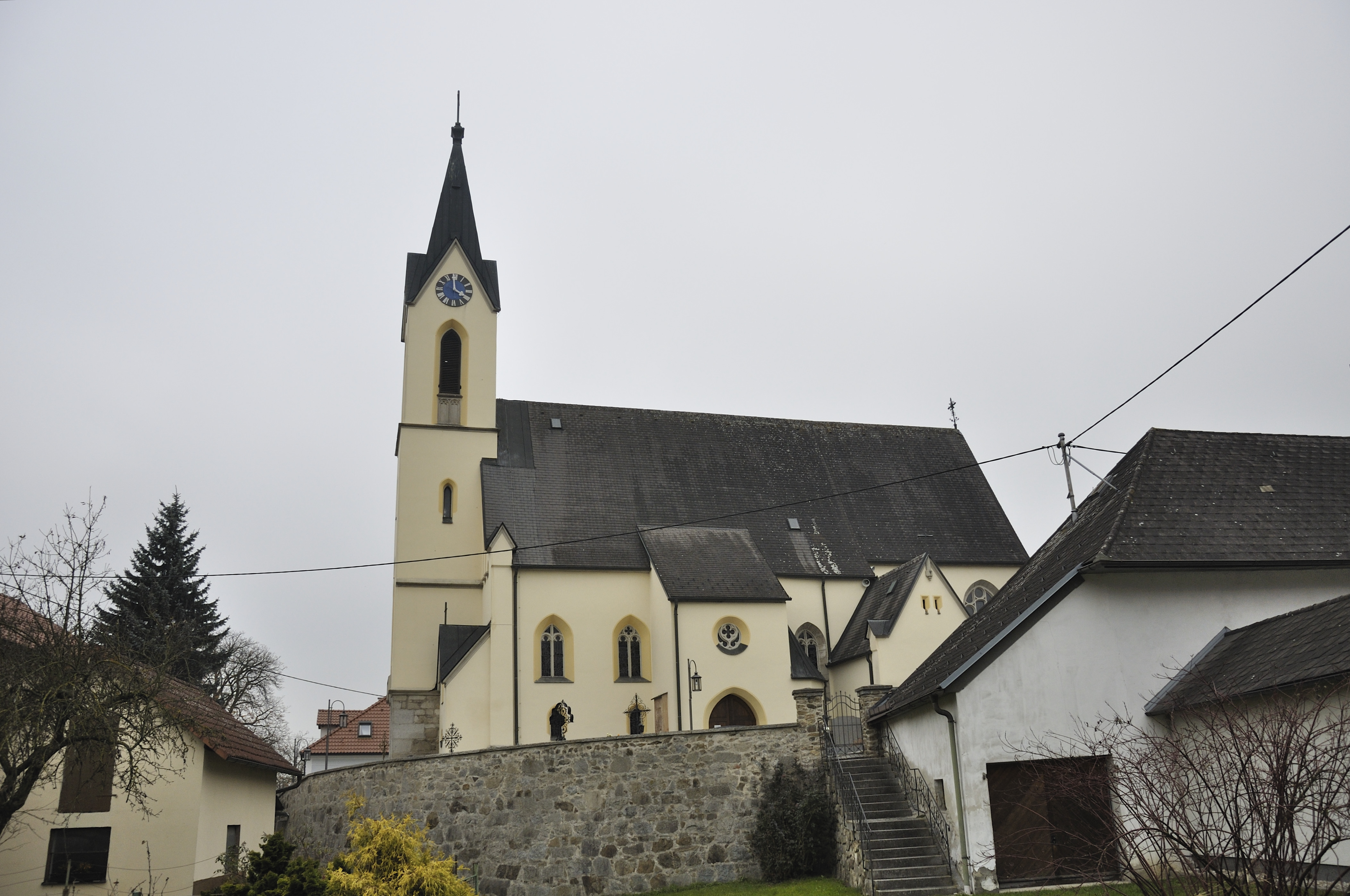 Kath. Pfarrkirche hl. Stephan mit Friedhof